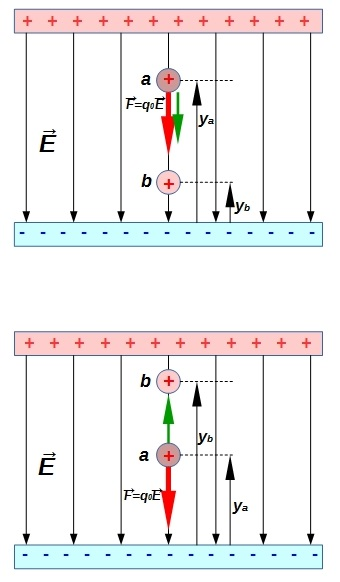 Electric potential for a positive charge in motion in the direction of the electric field E (over) and against the field (down).